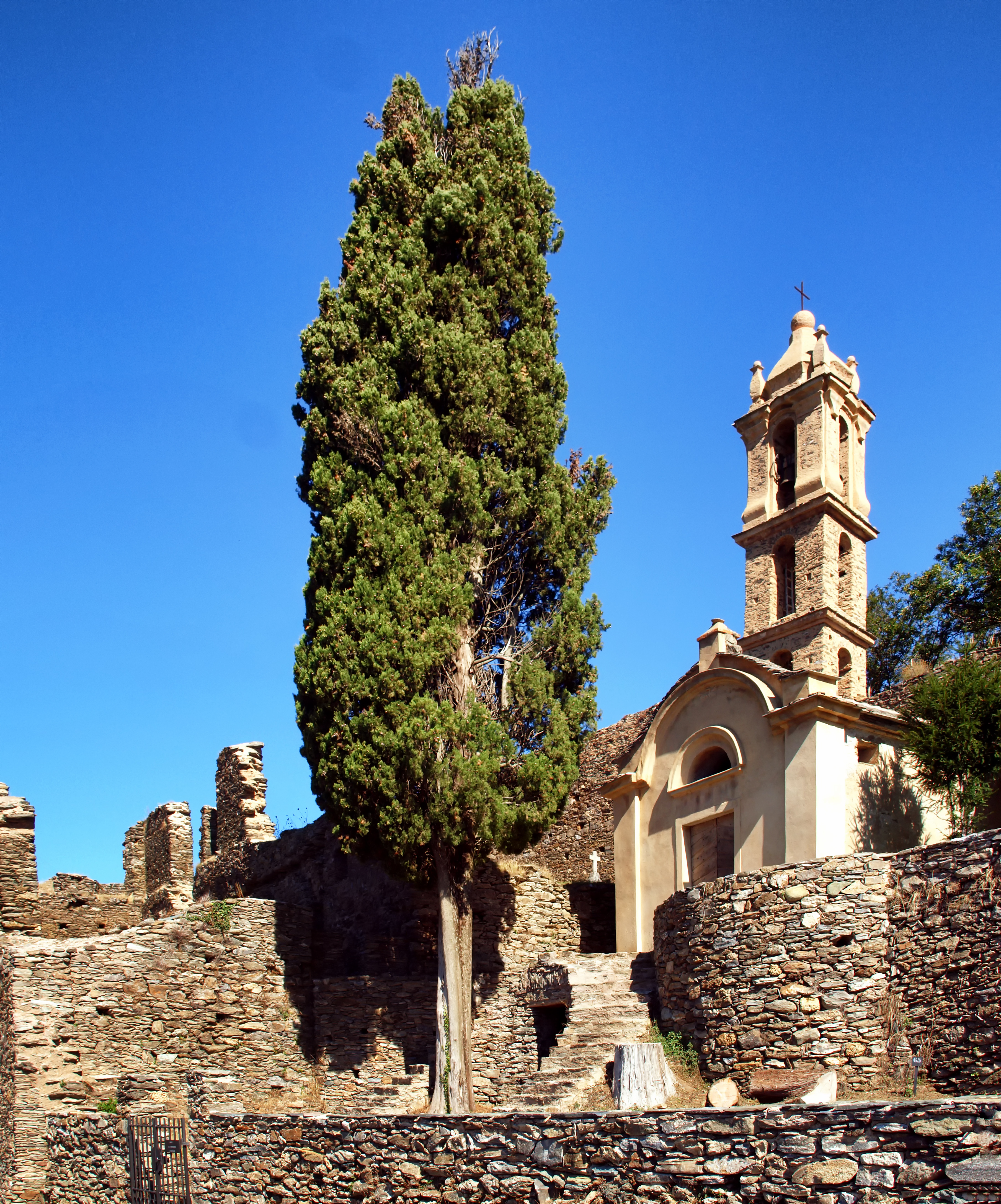 Casabianca, Castagniccia (Corse) - Les ruines de l'ancien couvent Saint-Antoine (Sant' Antone) qui, avec son clocher, sont inscrits aux monuments historiques.